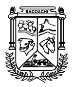 Escudo del municipio sonorense.